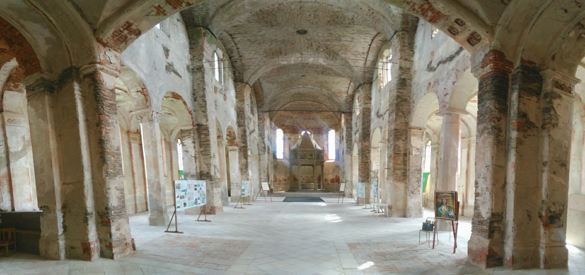 Kostel svatého Václava, Výsluní, okres Chomutov.